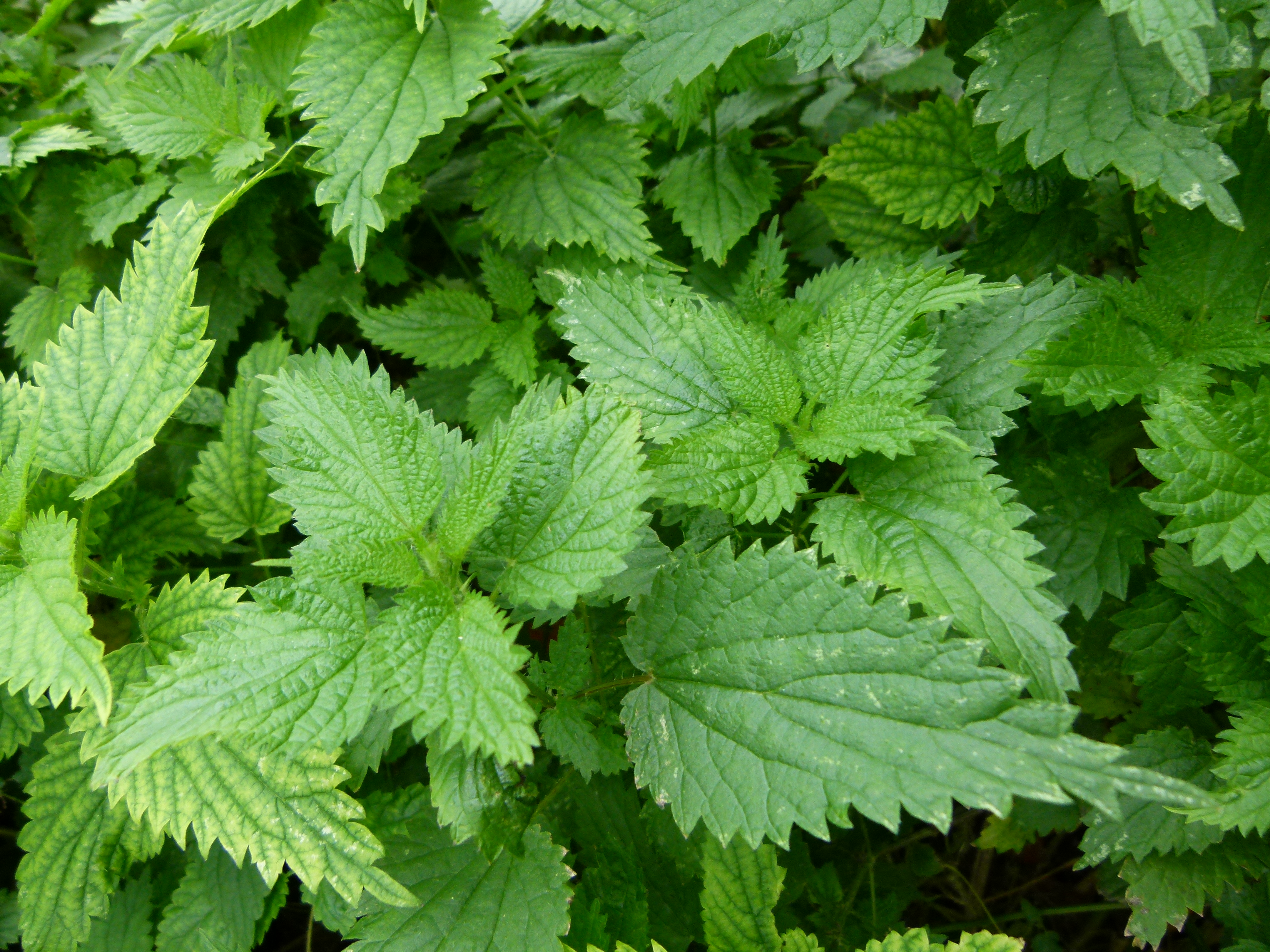 Ortie